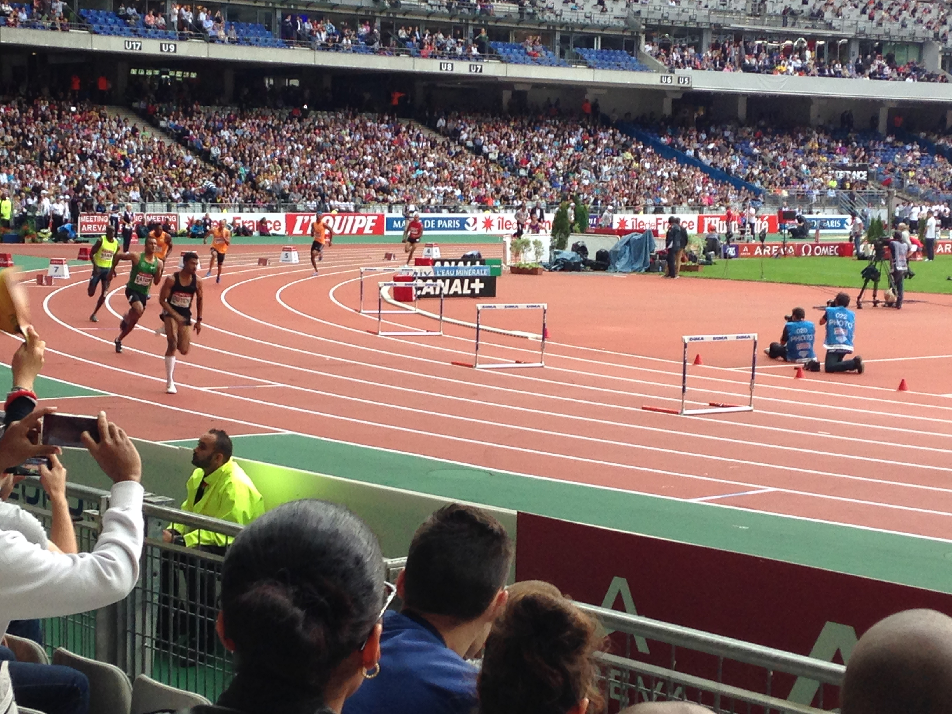 Départ du 400 mètres haies au au Meeting Areva 2014